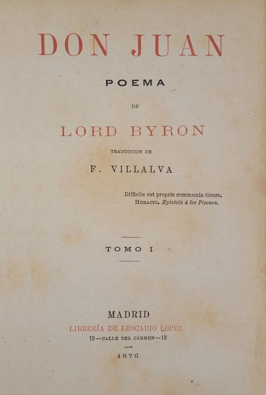 Portada de la tercera edición en español del libro Don Juan de Lord Byron